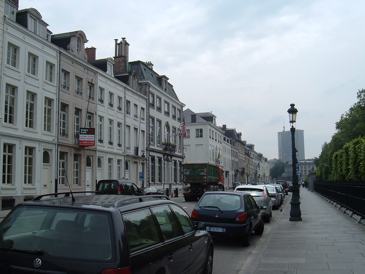 Stræti í Brussel, Belgíu, Hertogstraat/Rue Ducale street in Brussels, Belgium, with the American Embassy